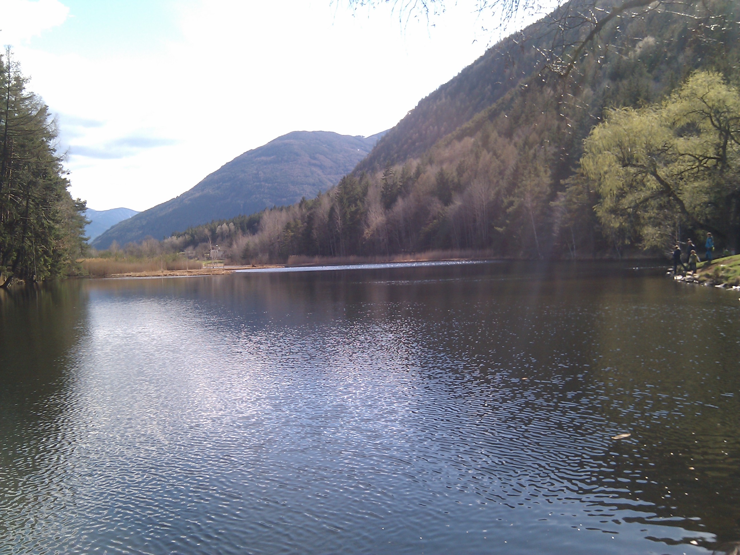 Vahrner See